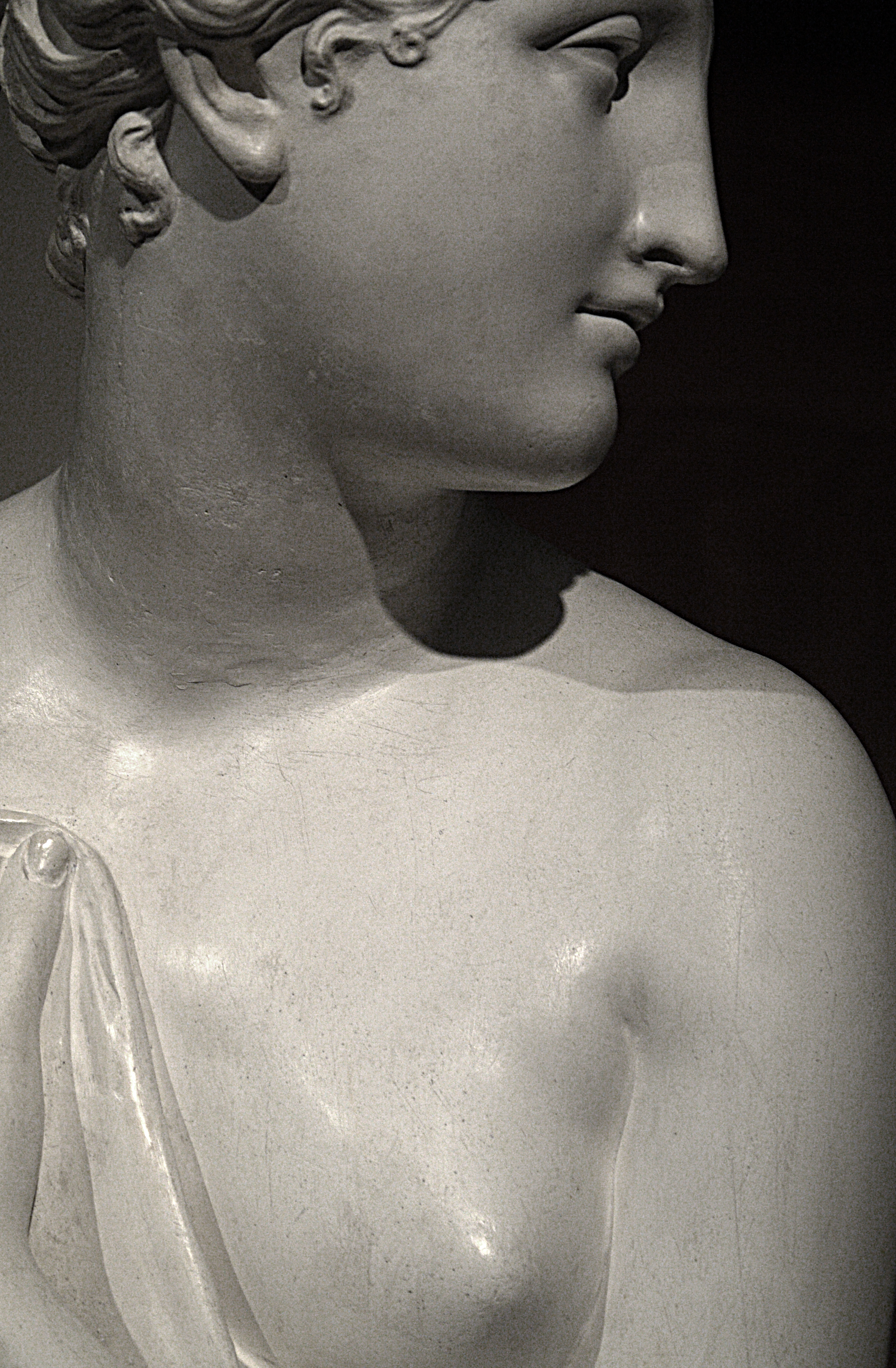 Venus Itálica de Antonio Cánova:"Cuando, en 1803, Napoleón hizo trasladar la Venus de Medici a París, los florentinos se quedaron sin uno de sus más preciados tesoros. Por este motivo solicitaron a Antonio Cánov, una réplica de la adorada estatua antigua. El artista, reacio al principio, accedió, finalmente a su ejecución, aunque tras algunos años de trabajo la copia de la Venus de Medici acabó convirtiéndose en el germen de la Venus Itálica, una nueva escultura creada, con apreciables diferencias con la mencionada obra florentina. Venus, sorprendida en su baño, se cubre parte del cuerpo con una tela que se enrosca sobre su brazo derecho y cae a sus pies hasta parecer que se funde con la propia base de la escultura. El rostro, de una belleza angelical, se vuelve acompañando el movimiento del cuerpo, para intensificar el efecto de sorpresa y ofrecernos múltiples puntos de vista. Autor: Antonio Cánova. Estilo: Neoclasicismo (siglo XIX) Estatua expuesta en el Museo de Reproducciones de Bilbao.